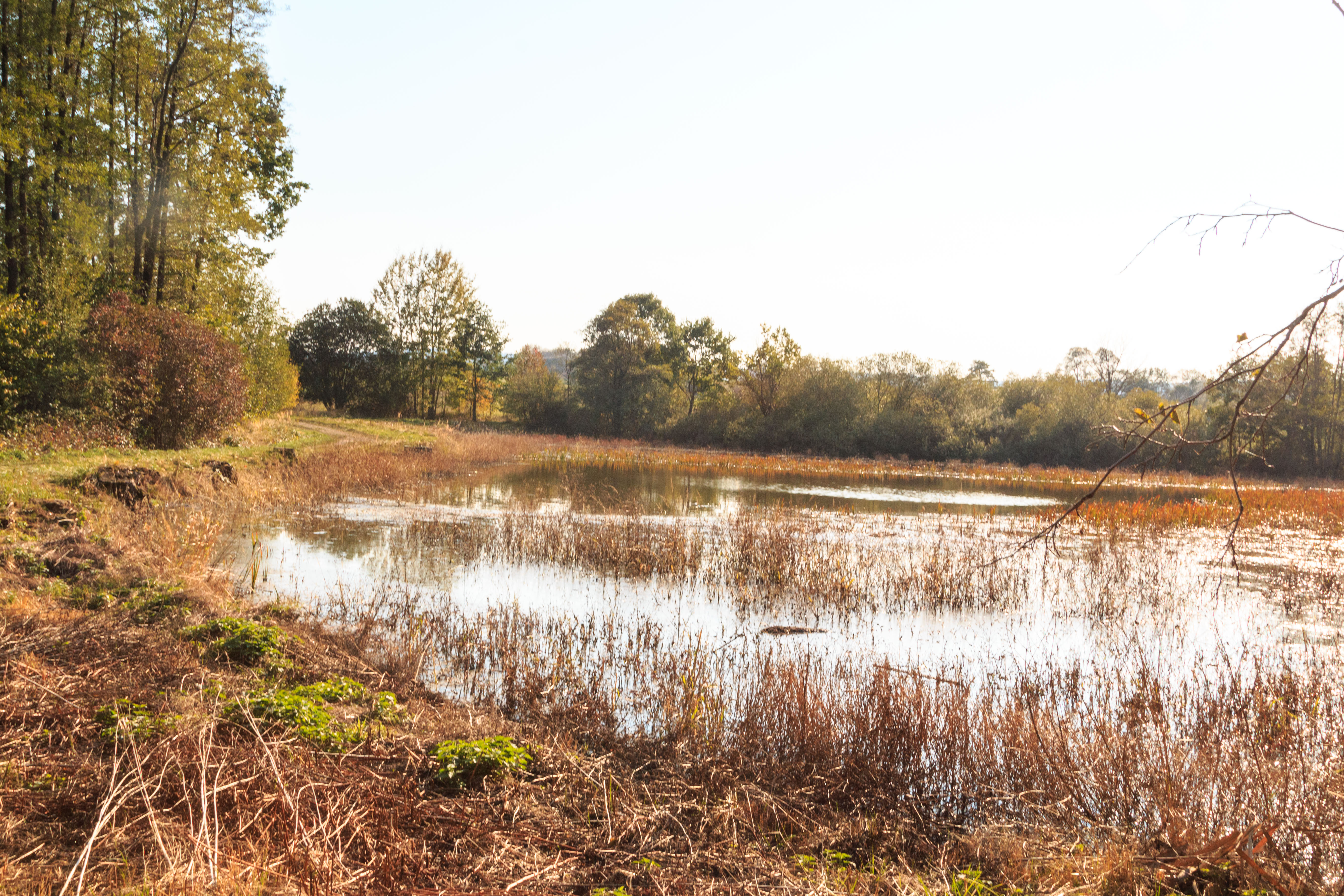 rybník Jezírko u Podlíšťan Project: Vodstvo. Ticket: 1617.